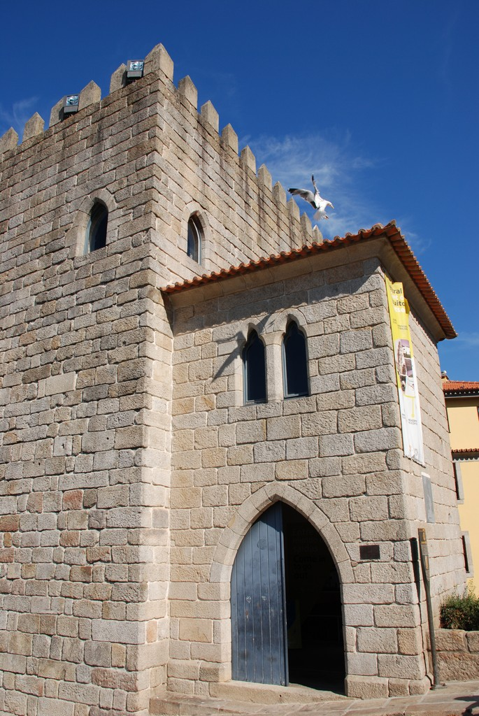 Medieval building